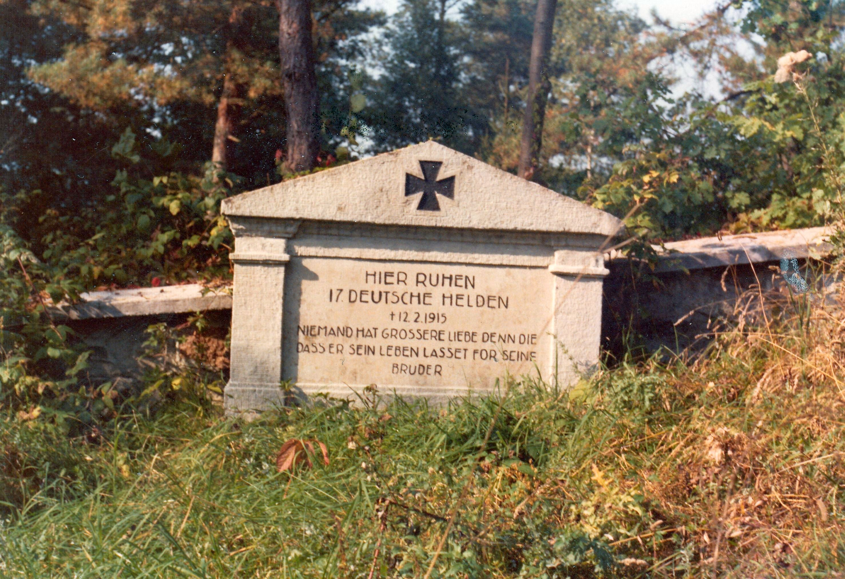 Grabstein am Heldenfriedhof von Talusy